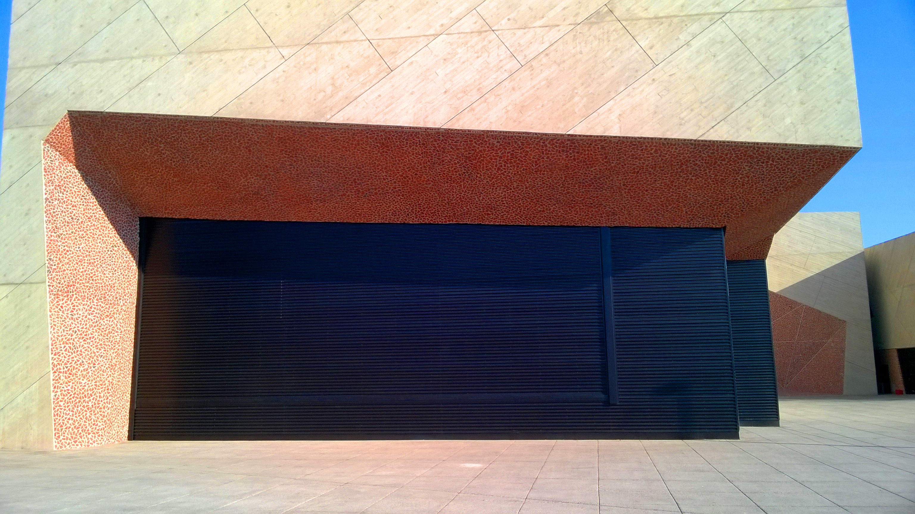 Centrum Kulturalno-Kongresowe Jordanki w Toruniu93